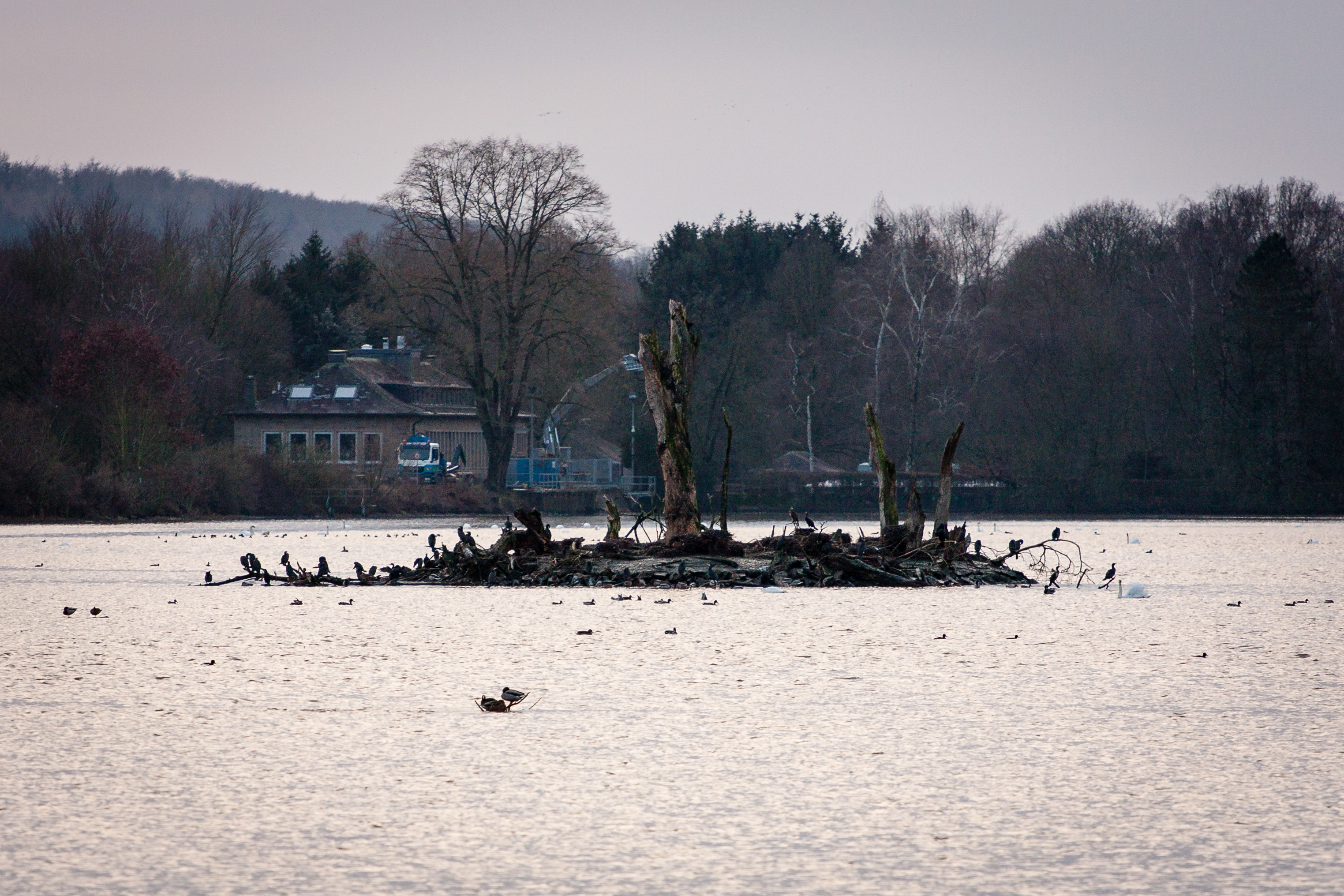 Die Kormoran-Insel im Hengsener Stausee